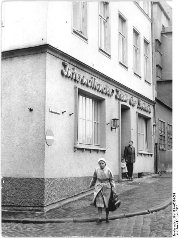 Rostock, Internationaler Seemannsklub Zentralbild Rostock-Löwe 5.6.57-Qua-L- Entwicklung des Ostseebezirkes - Internationaler Seemannsklub in Rostock. Durch großzügige Unterstützung durch unsere Regierung entstanden in den Hafenstädten Rostock, Wismar und Stralsund Klubhäuser für die in- und ausländischen Seeleute. Seit Bestehen der Klubhäuser besuchten weit über 10.000 ausländische Seeleute diese Kulturstätten. UBz: Der Internationale Seemannsklub in Rostock.